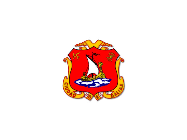 Bandera de Dalías.